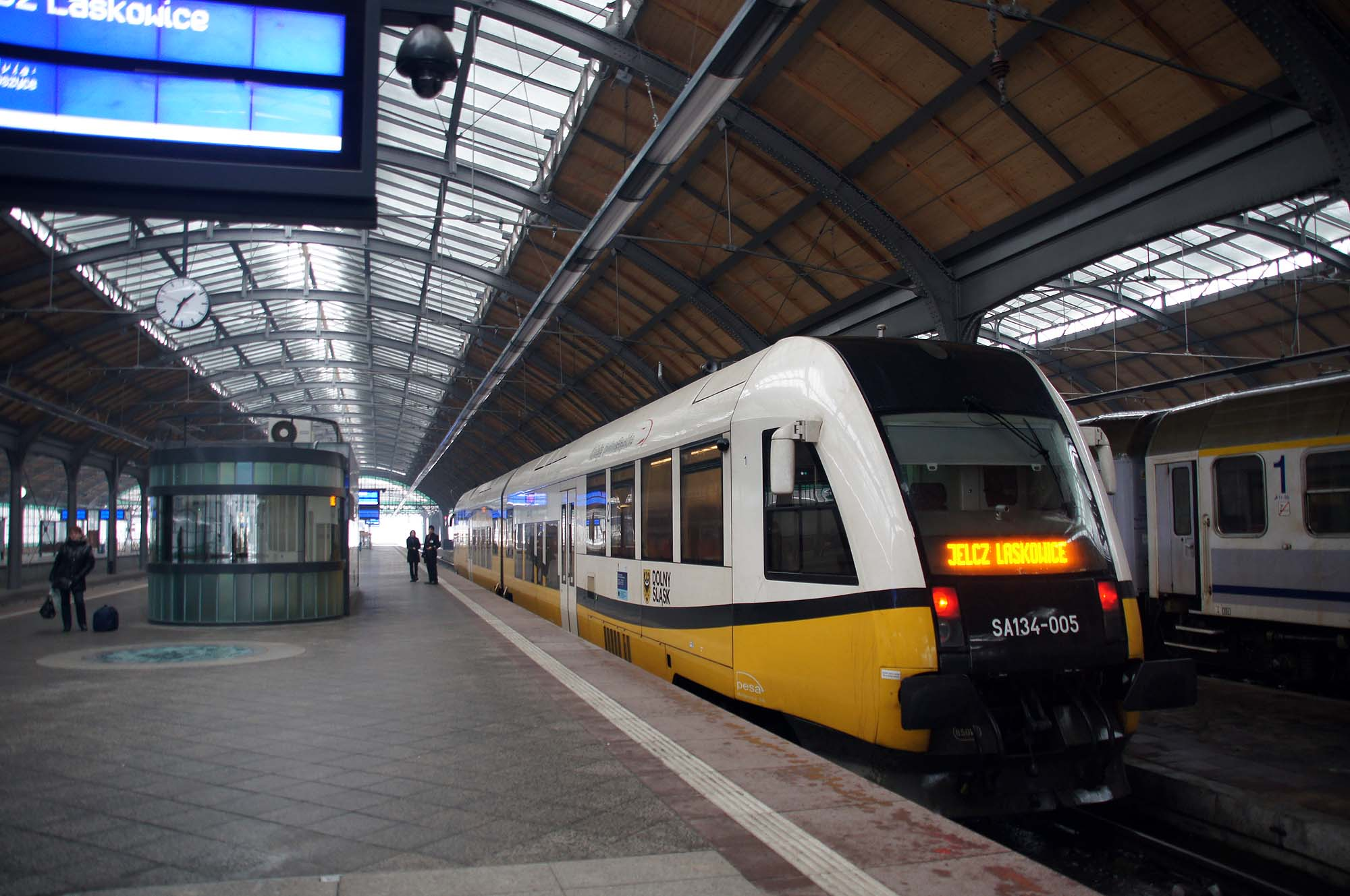 Wrocław, zespół Dworca Głównego